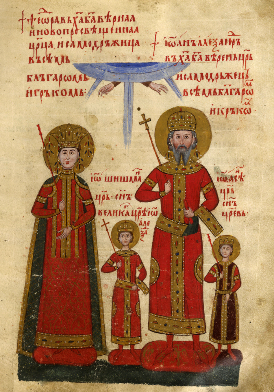 Цар Иван Александър със семейството си. Миниатюра от Лондонското евангелие на Иван-Александър.